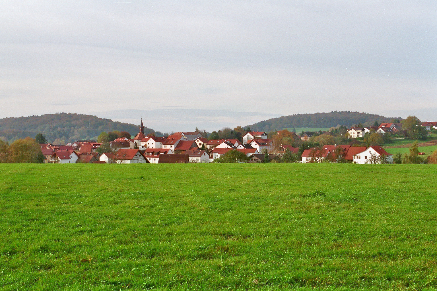 Ortsansicht des Ortes Ober-Abtsteinach, Hauptort der Gemeinde Abtsteinach in Südhessen, Hessen, Deutschland. Blick von Osten nach Westen. Zu sehen ist unter anderem die Ortskirche St. Bonifatius.